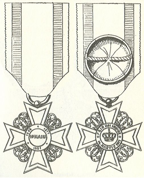 Orde van de Kroon van Roemenie